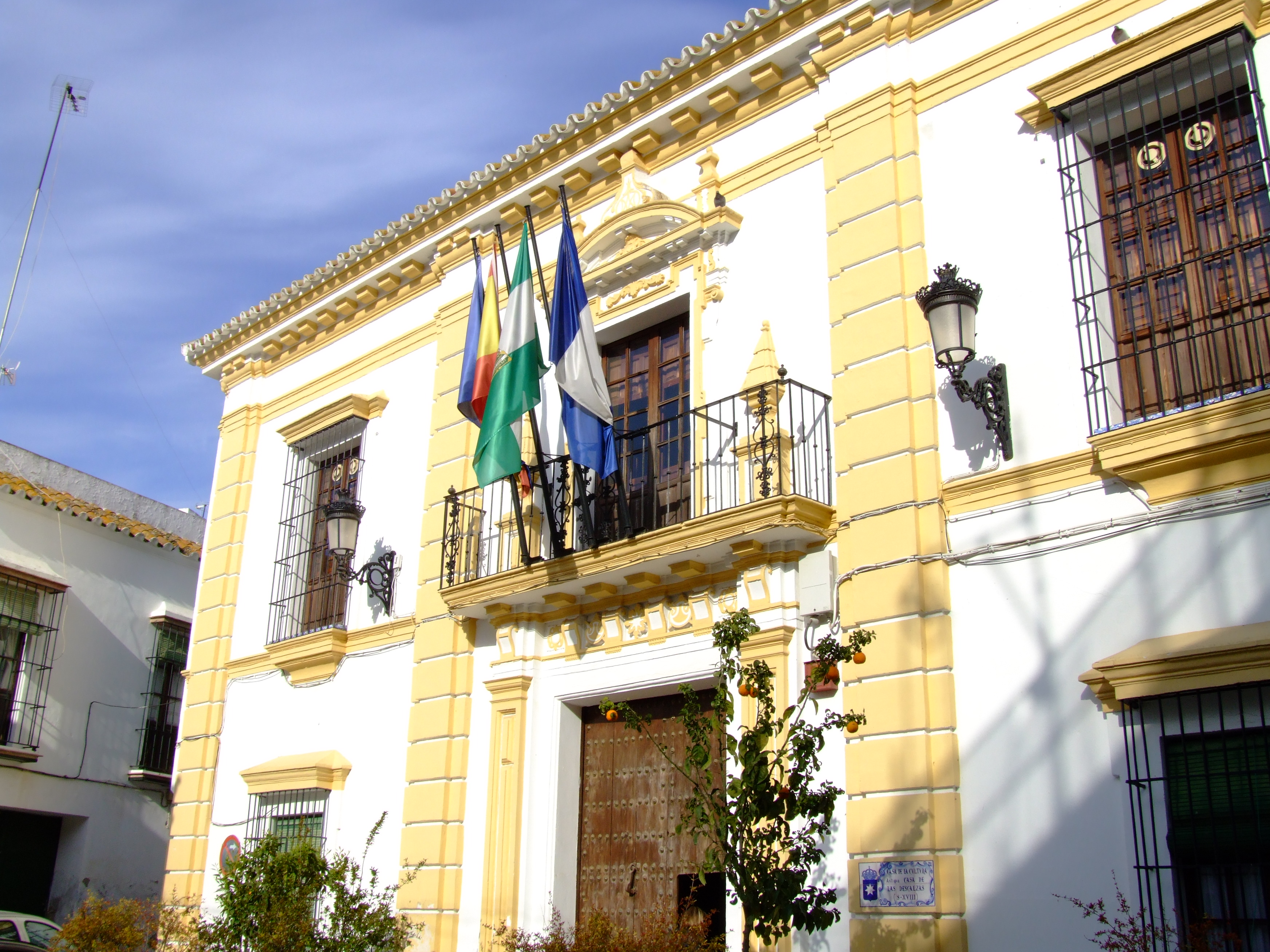 Casa dela Cultura. Carmona (Sevilla)